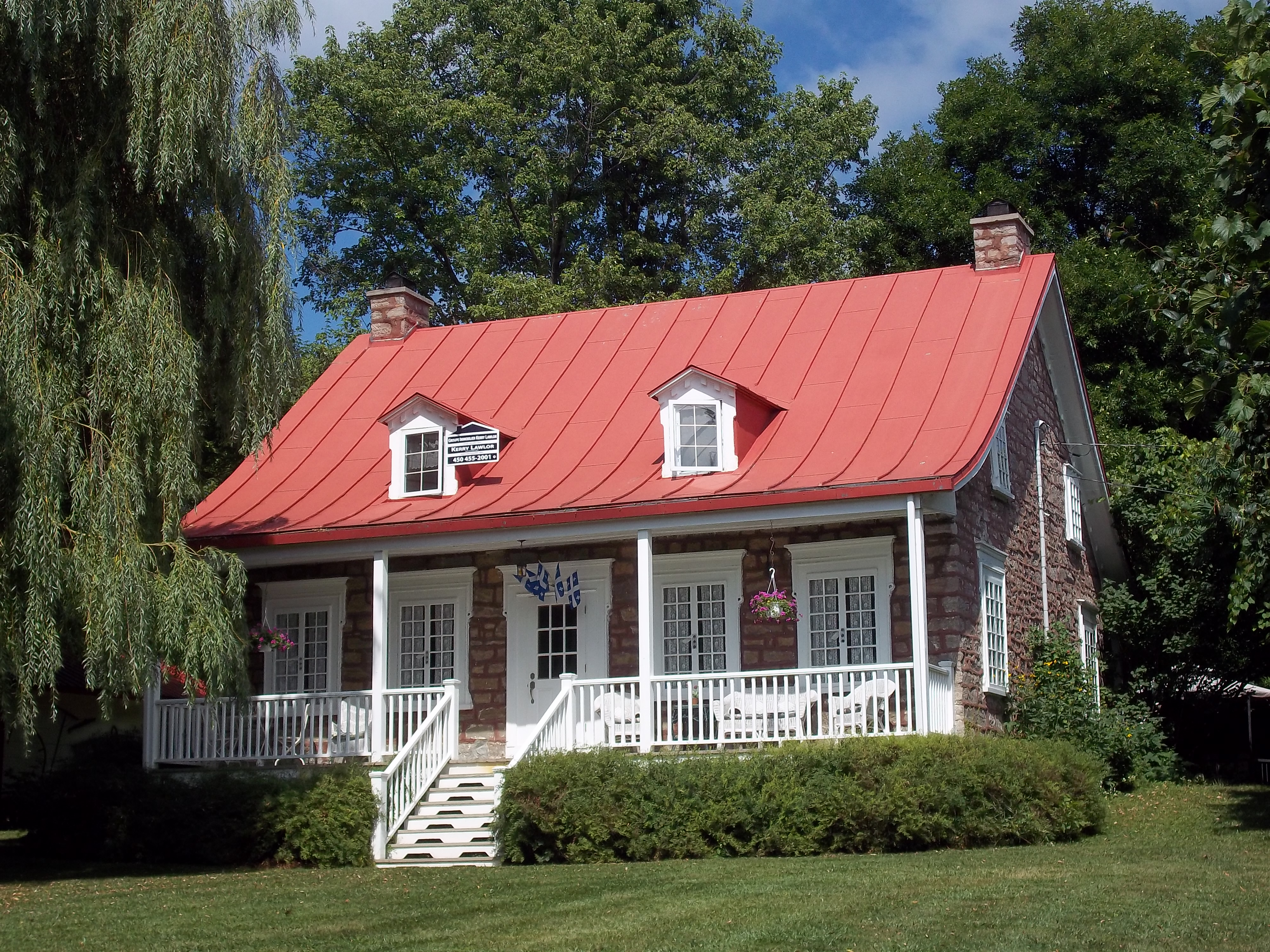 Maison Joseph-Théoret, 20, rue Martel, Montréal.